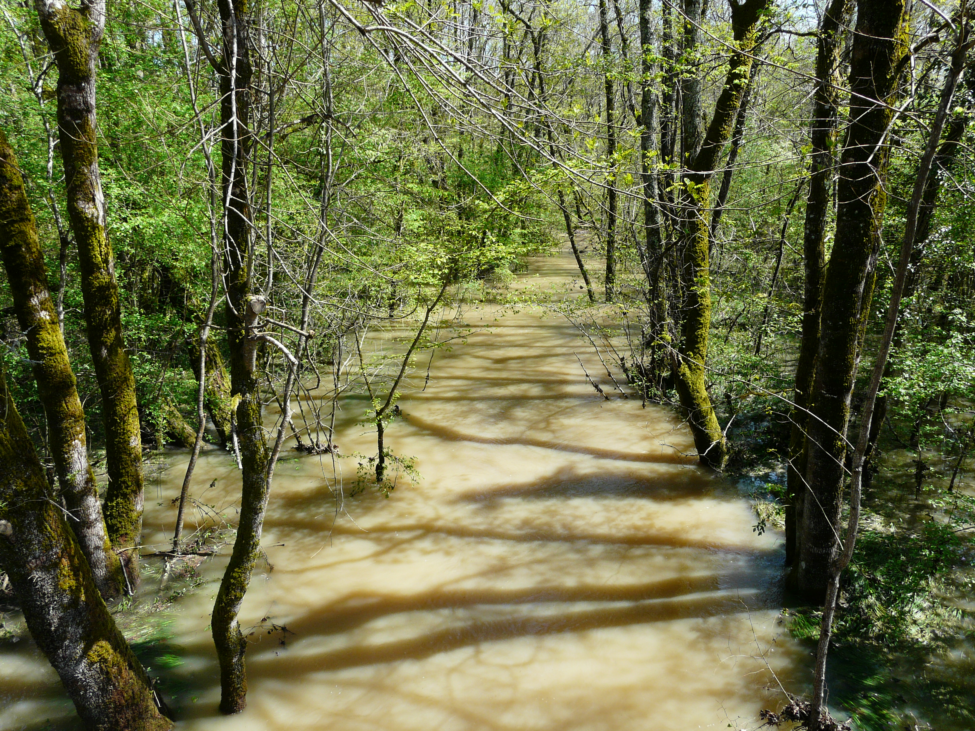 La Lidoire en crue en amont de la route départementale 708. Communes de Saint-Rémy (à gauche) et Saint-Méard-de-Gurçon (à droite), Dordogne, France.